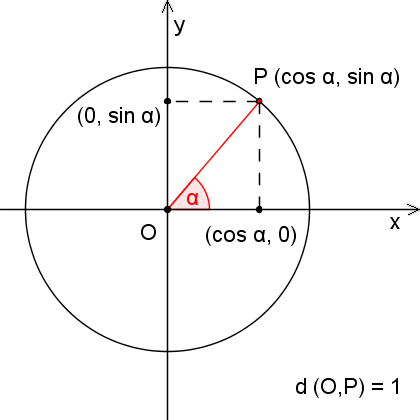 grafische weergave definitie sinus en cosinus